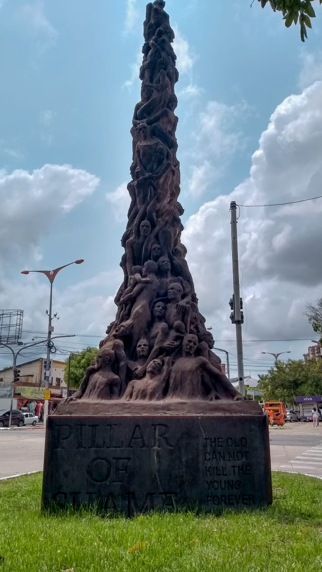 A escultura do artista dinamarquês Jeans Galschiot, doada à prefeitura de Belém, representa o Massacre de Eldorado dos Carajás, ocorrido em 17 de abril de 1996. Dezenove camponeses sem-terra foram mortos pela Polícia Militar e sessenta e nove ficaram feridos.